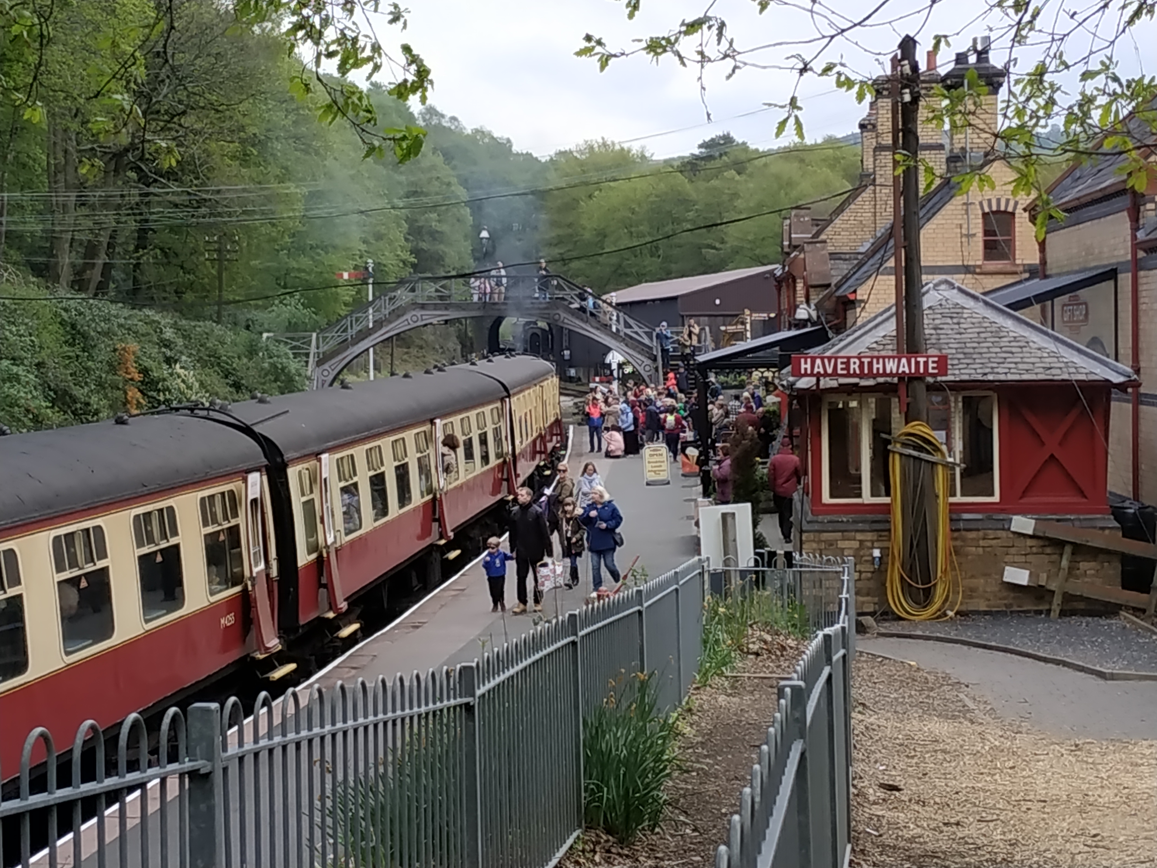 Haverthwaite, Lake District. U.K.